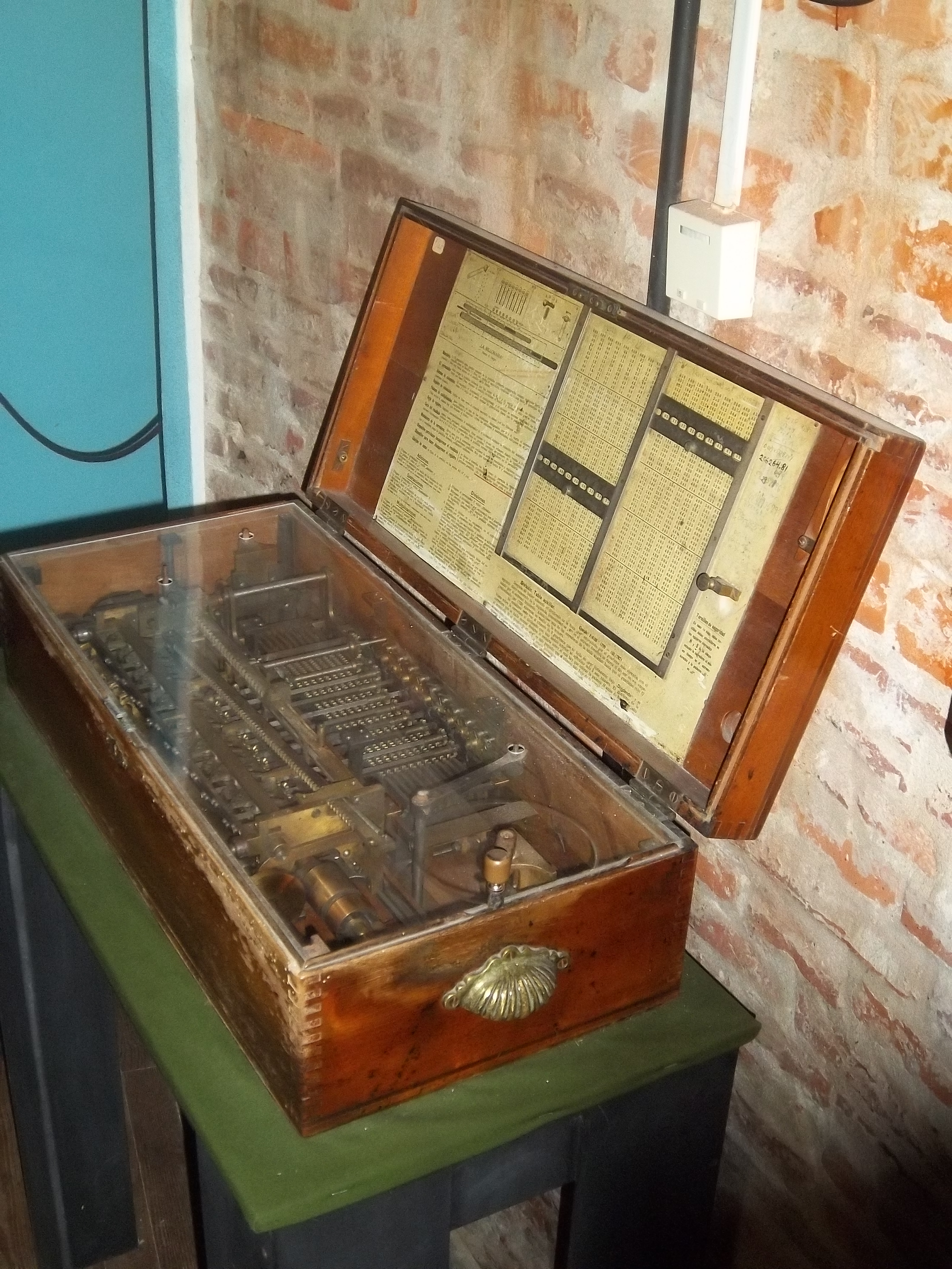 Antigua máquina de calcular que permitía las cuatro operaciones en el museo de astronomía de La Plata, provincia de Buenos Aires, Argentina.